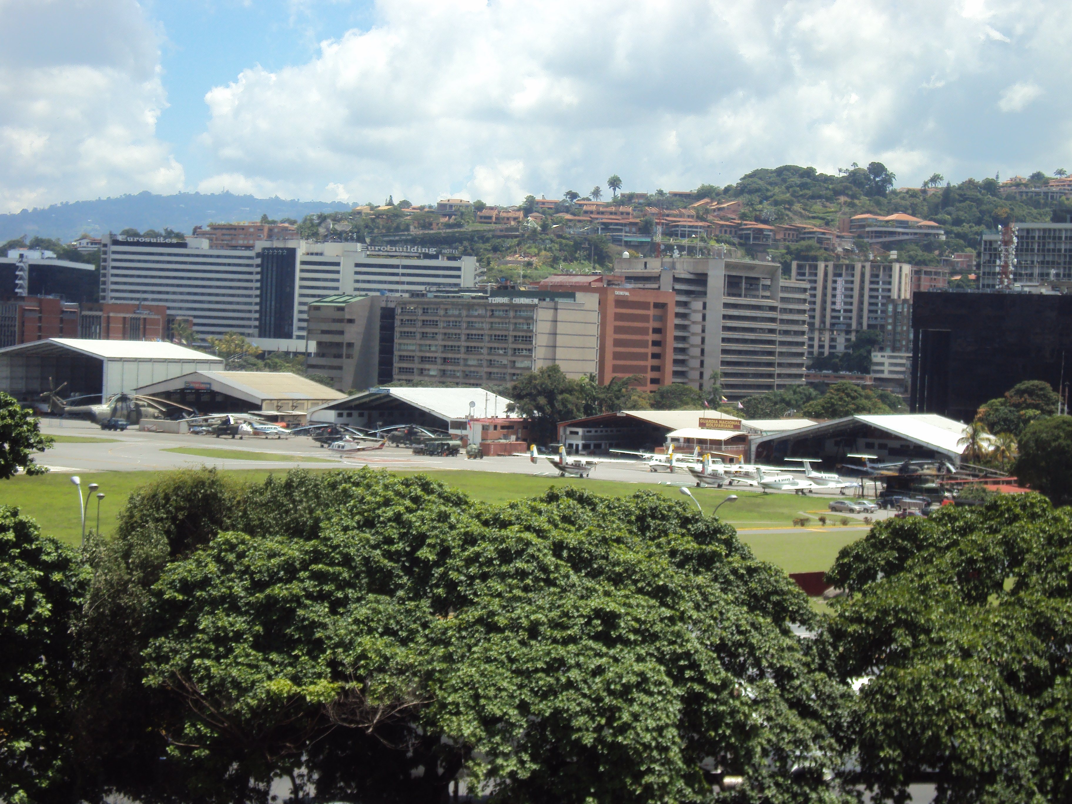 Base Aérea Generalísimo Francisco De Miranda O Aeropuerto La Carlota